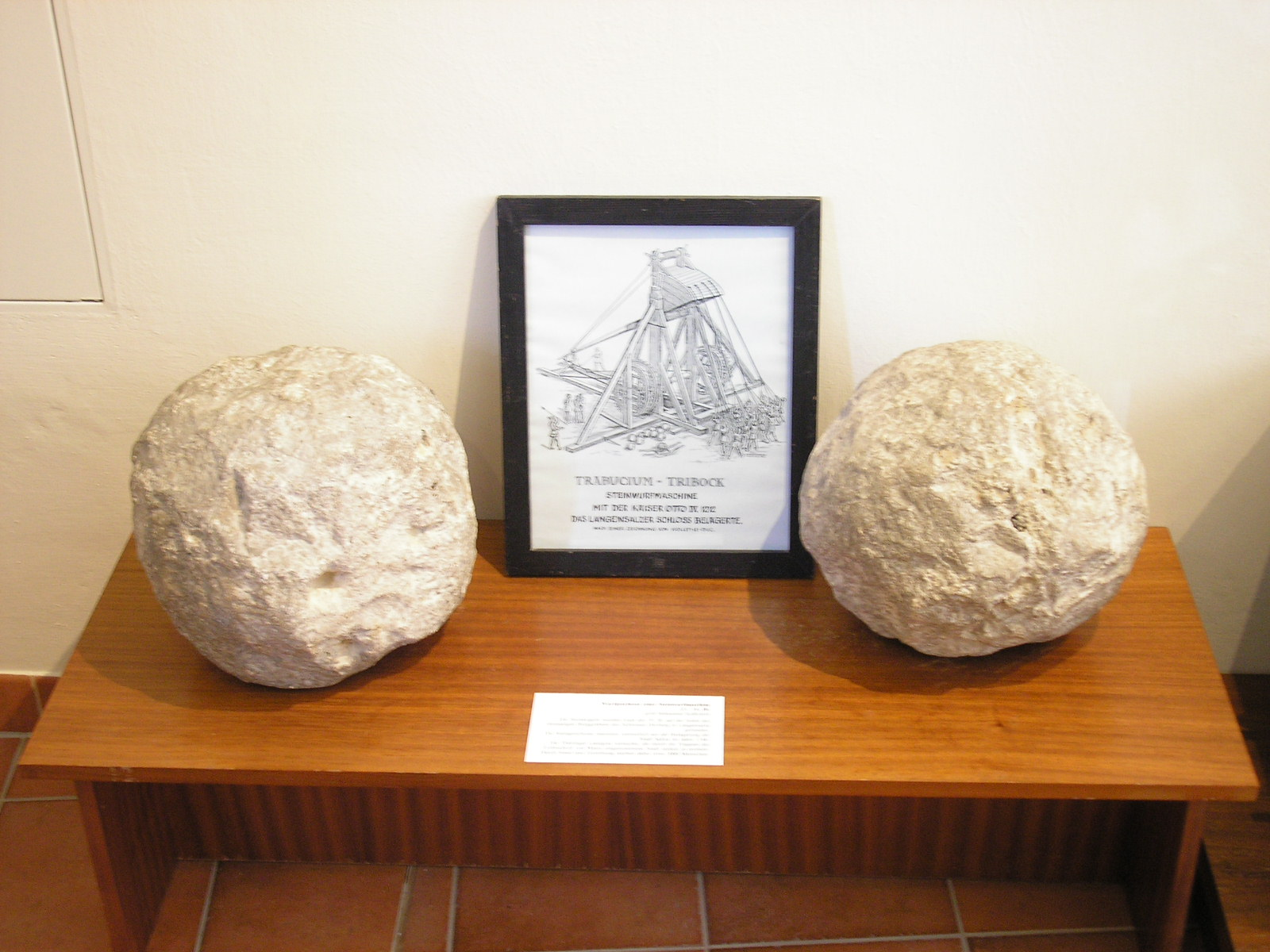 Tribockkugeln im Stadtmuseum von Bad Langensalza (Thüringen)